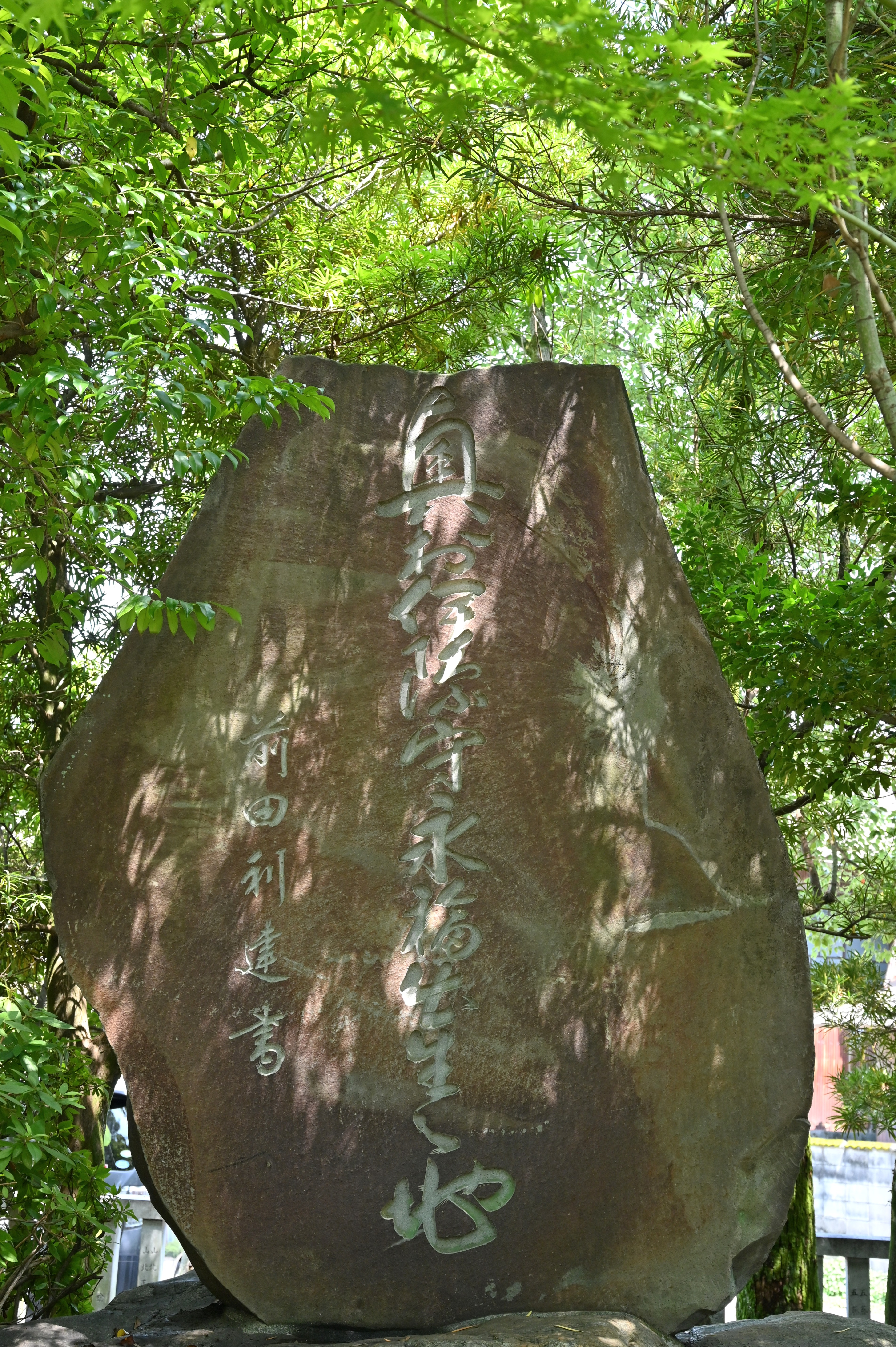 貴船神明社境内にある奥村永福生誕地碑